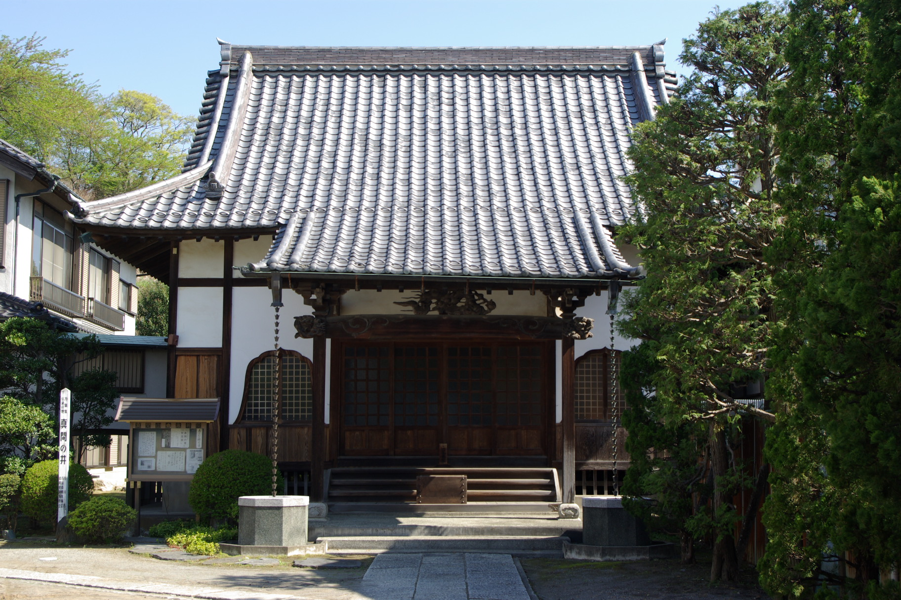 亀井院（千葉県市川市）